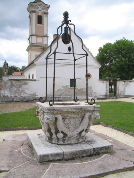 Majki díszkút a templommmal